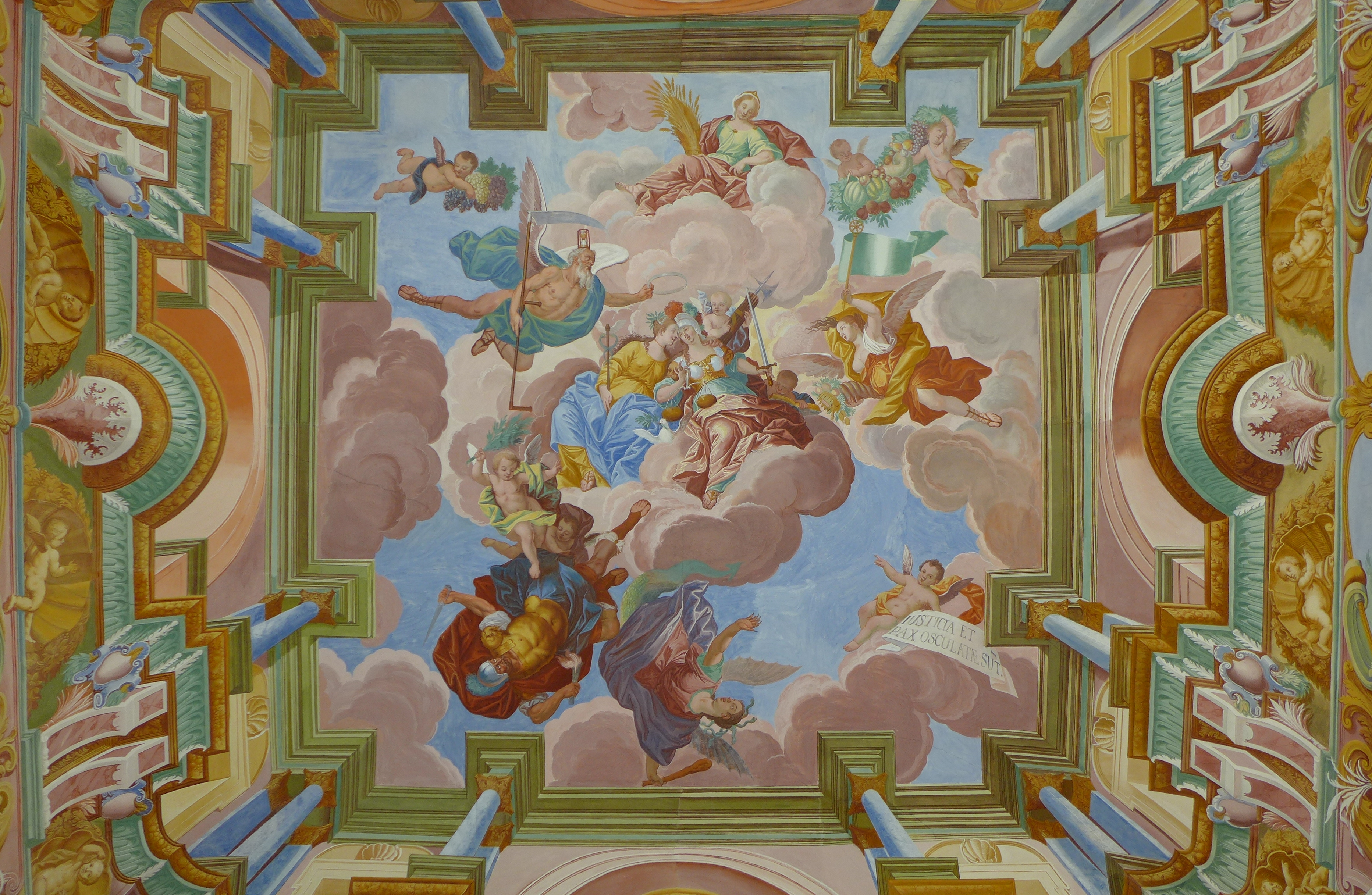 Stift Rein, Huldigungssaal, Allegorie "Justitia et pax osculatae sunt", Deckenfresko von Joseph Amonte, 1740